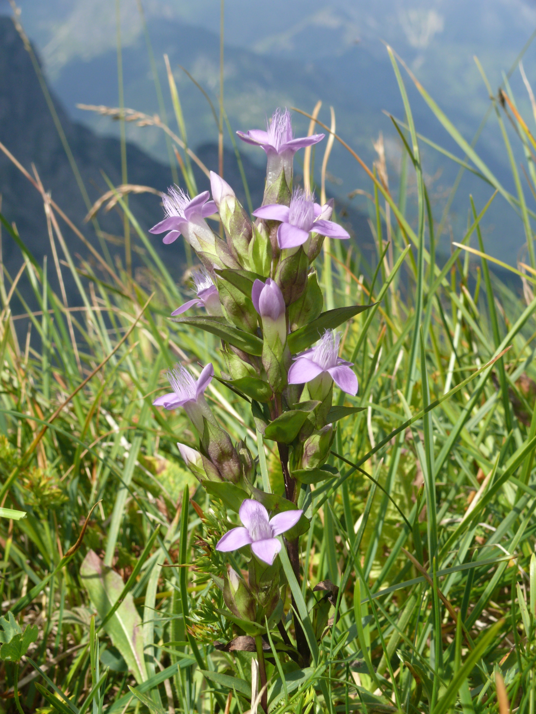 Gentianella campestris, Allgäuer Alpen, Deutschland